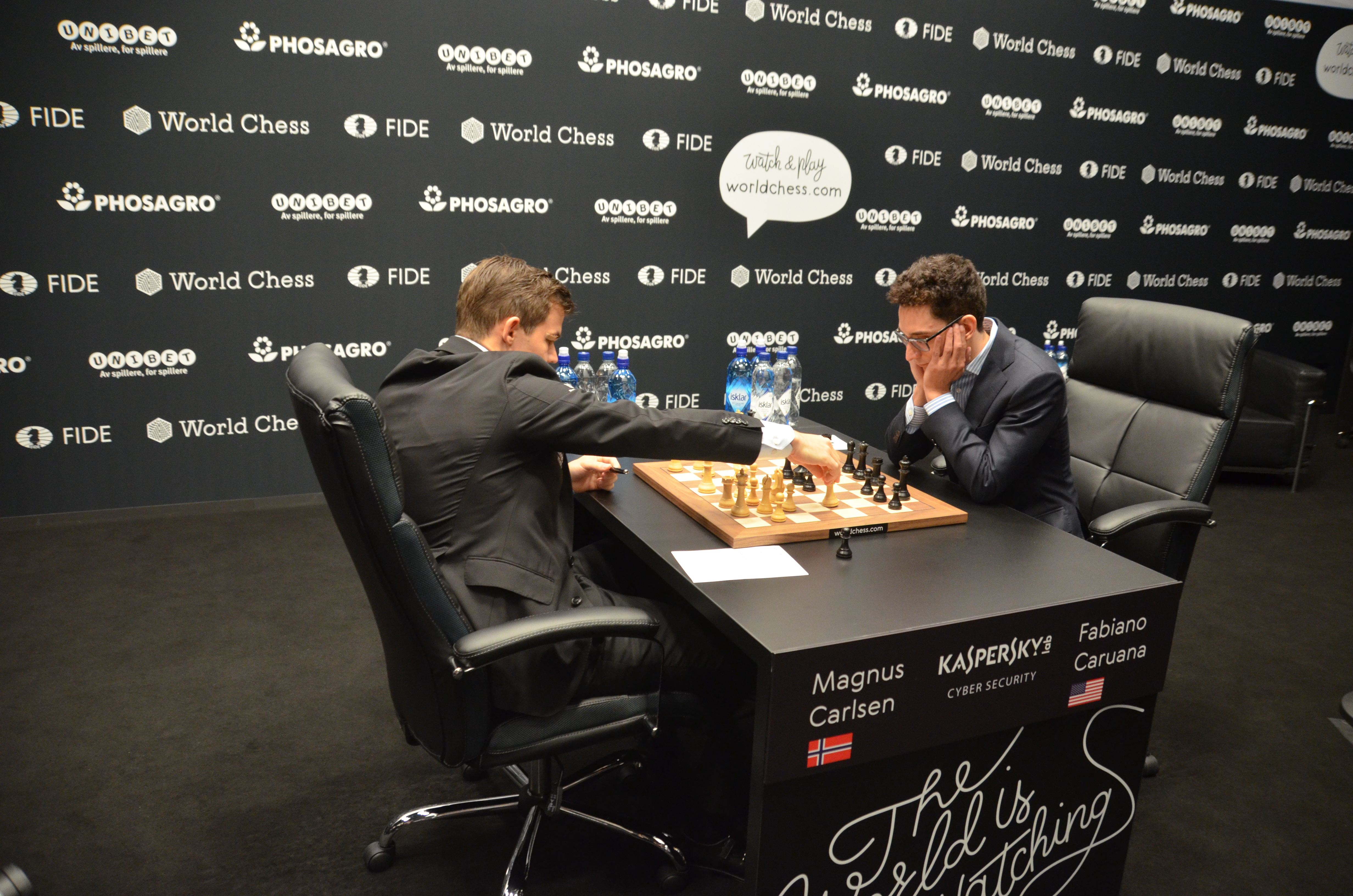 Carlsen-Caruana, novena partida del match por Campeonato del Mundo, Londres 2018